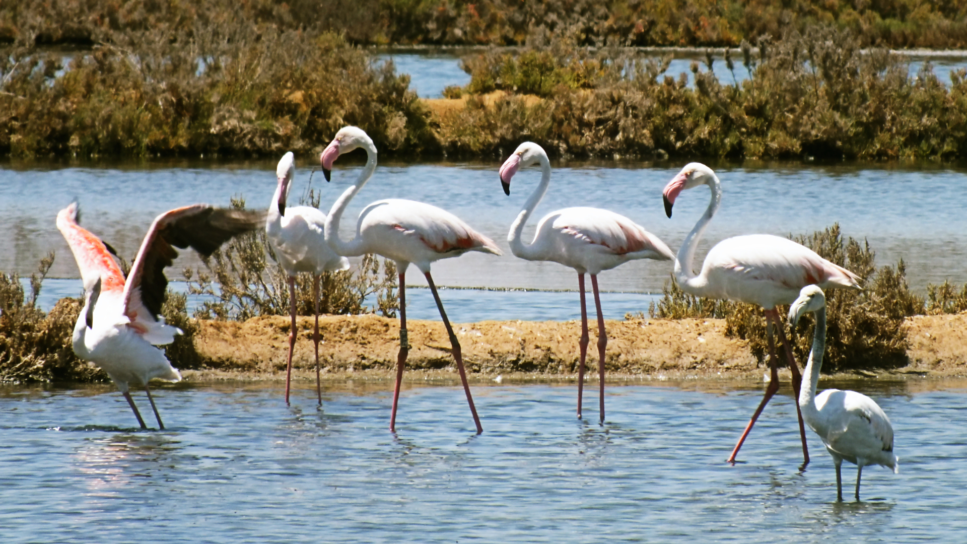 Ria Formosa, czerwonaki (flamingi różowe, Phoenicopterus roseus)